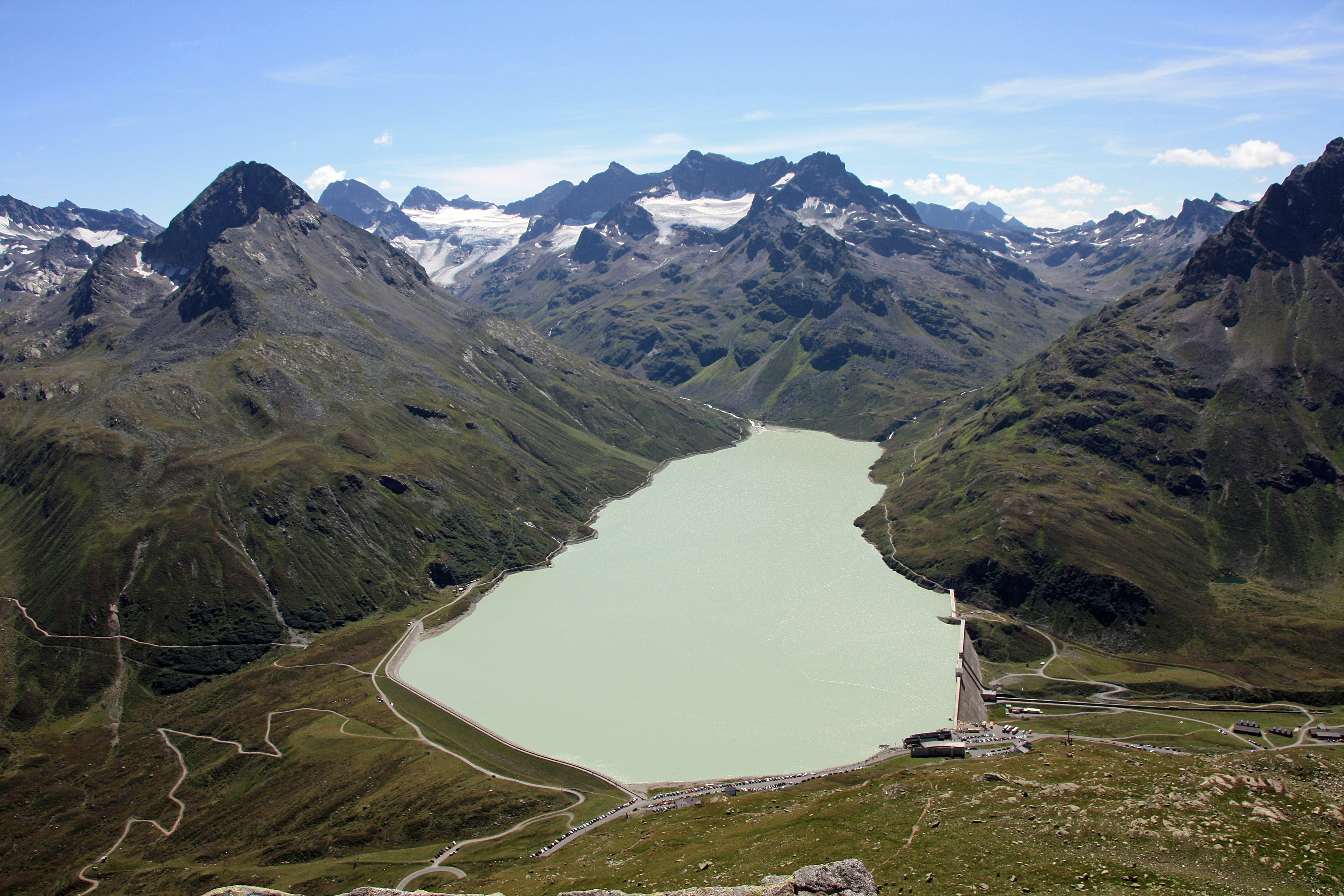 Blick von der Bielerspitze nach Süden über die Bielerhöhe (2037 m) und den Silvretta-Stausee (2030 m) mit dem umgebenden Bergen der Silvrettagruppe.